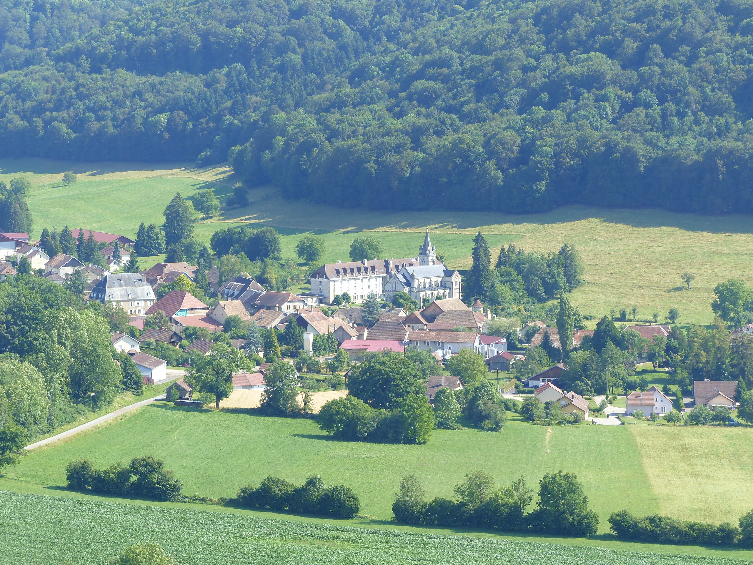 Sancey-le-Long vu du château de Belvoir